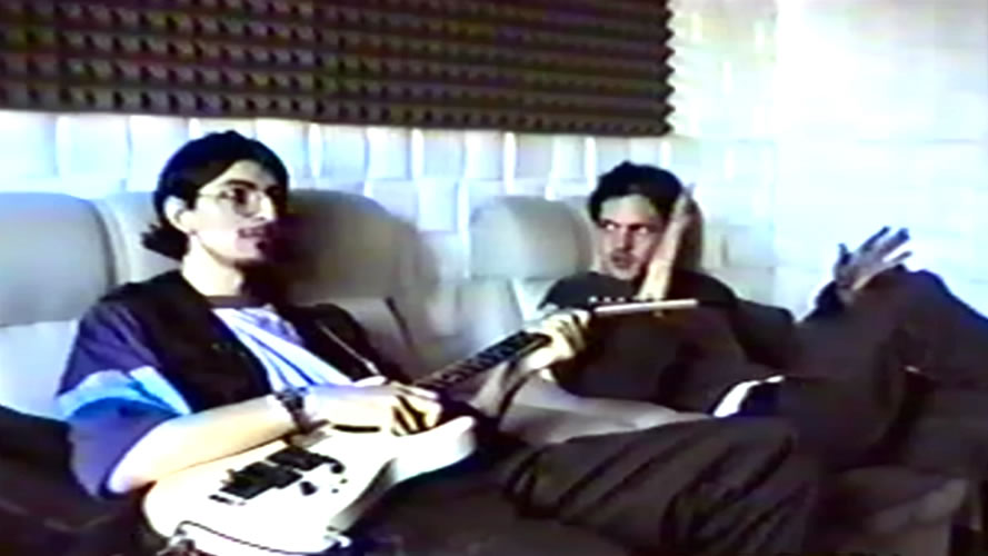 Miloš a Paľo počas nahrávania "Let's Make A Summer / Until", 1998